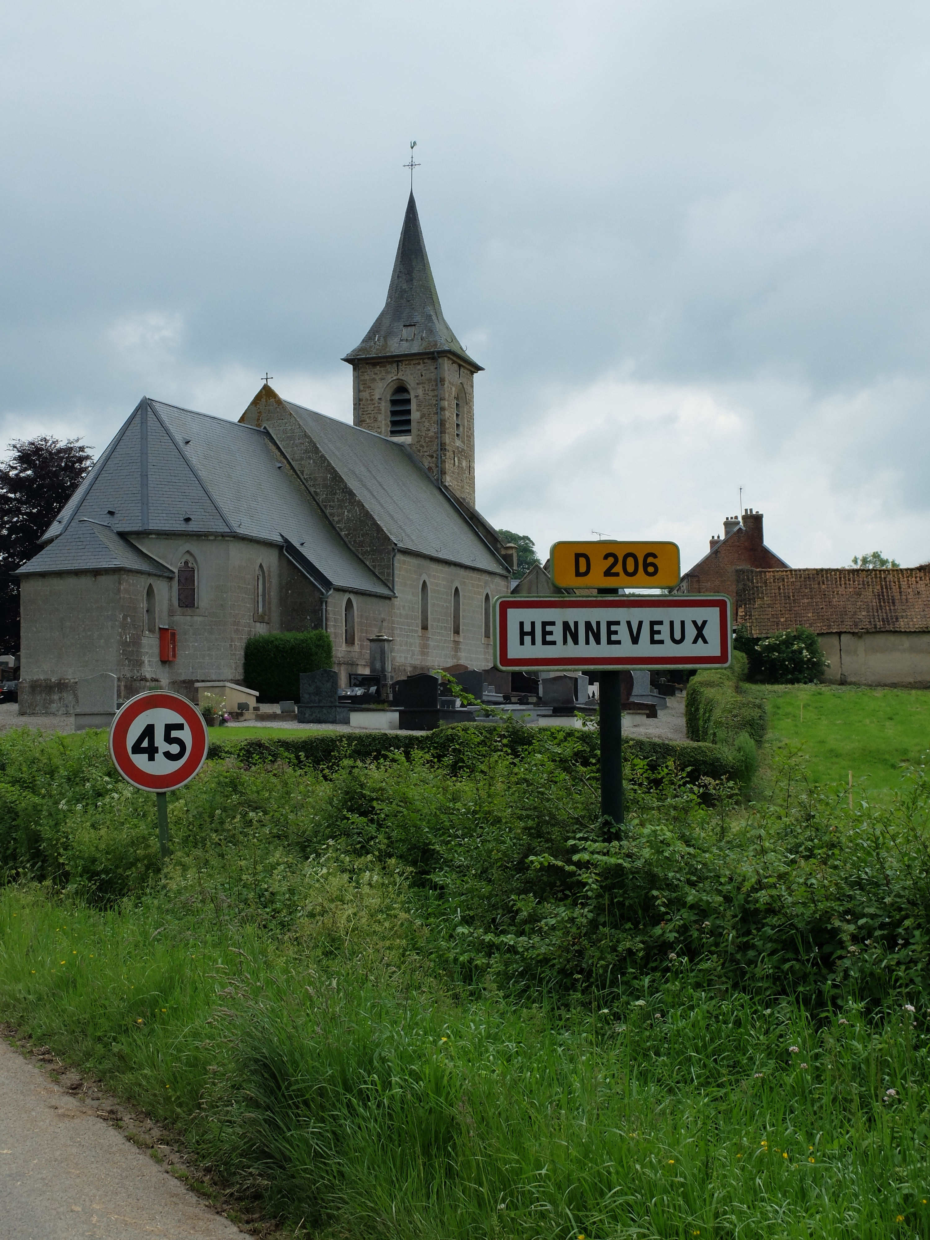 Vue d'une entrée de la commune d'Henneveux, entrée qui comprend l'église Saint-Folquin.